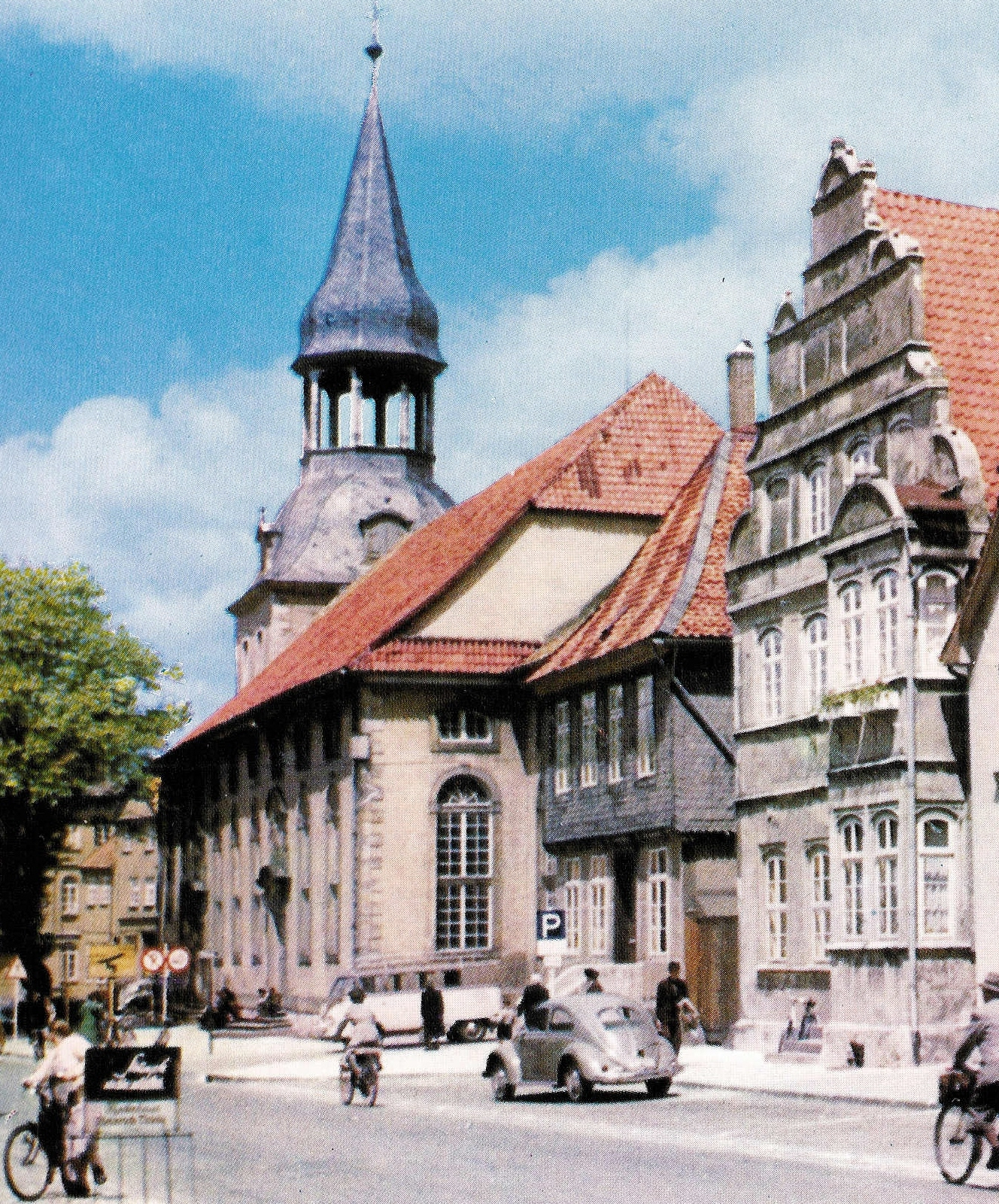 Nicolaikirche und Kavalierhaus um 1970. Public Domain. Von Gifhorner Bürger zur Verfügung gestellt.